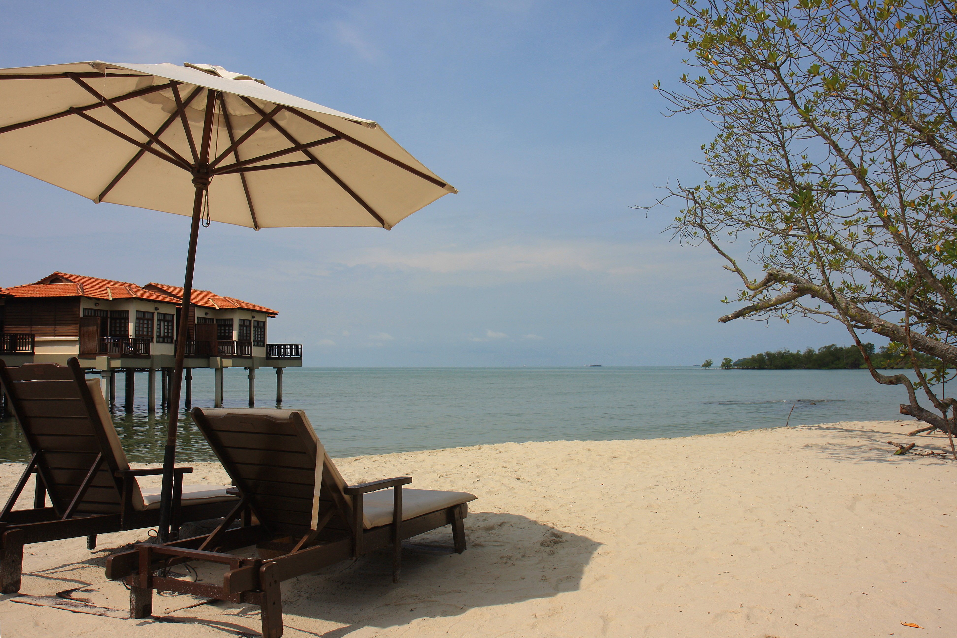 Photographie des châlets flottants prise dans le centre de vacances Avillion de Port Dickson (Malaisie)